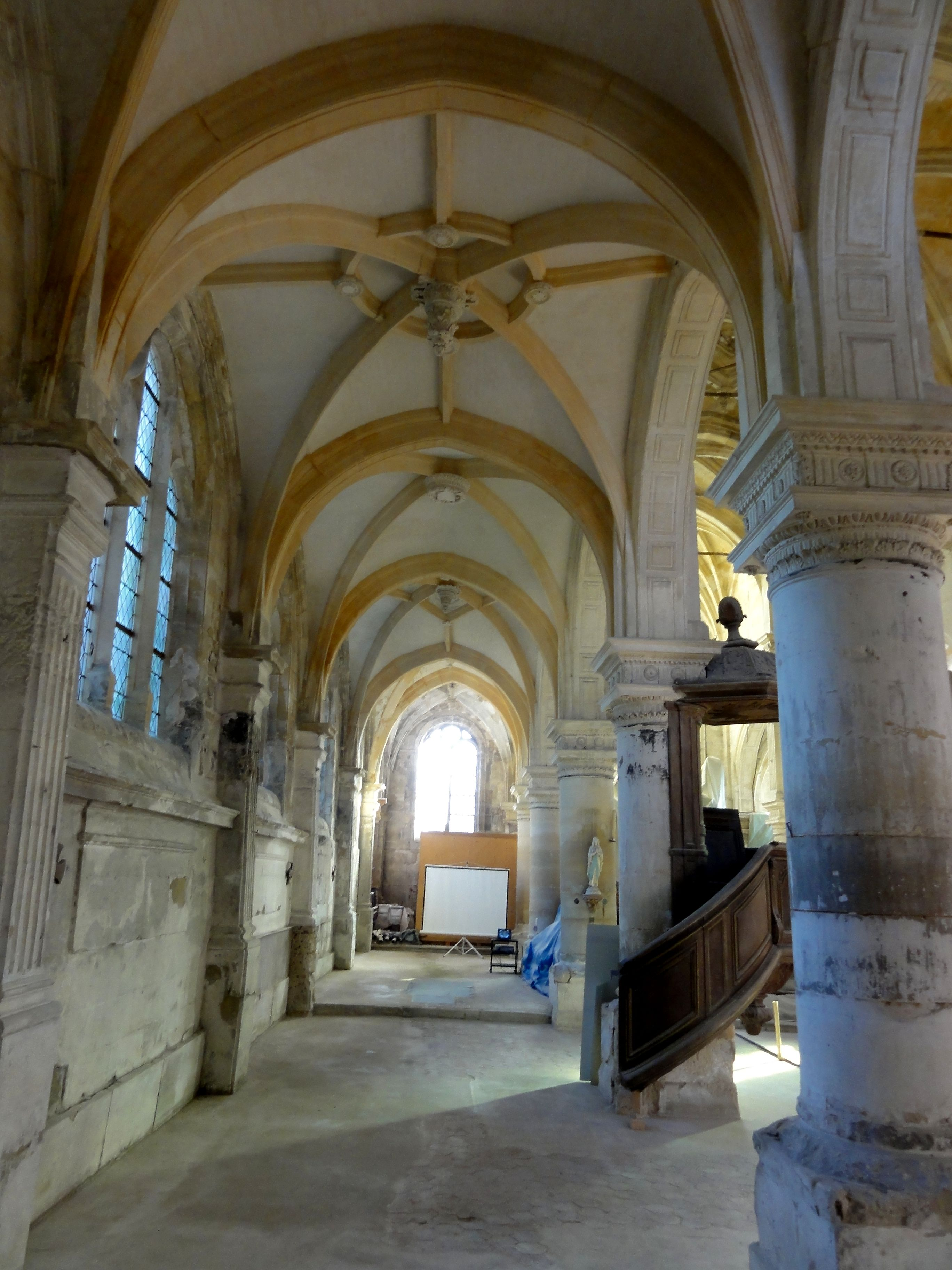 Bas-côté nord, vue vers l'est.